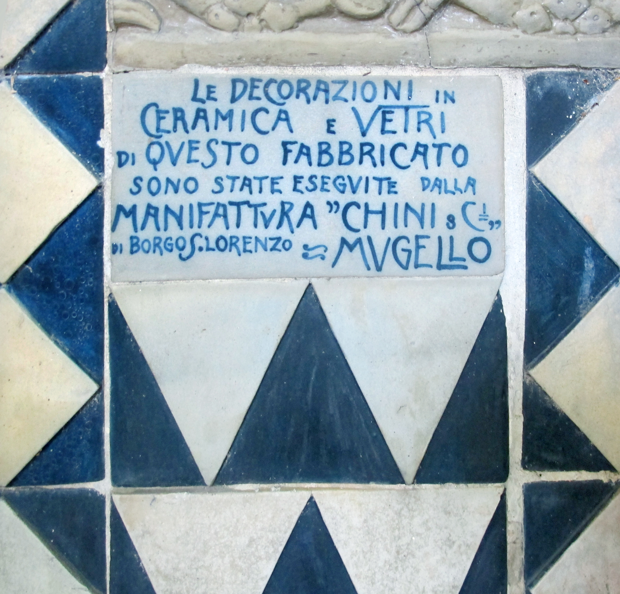 Terme tamerici, loggetta maioliche 06 firma manifattura chini